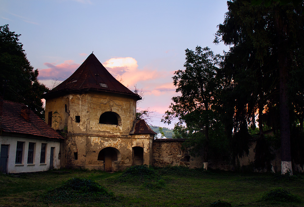 Одна з башт палацу Телекі